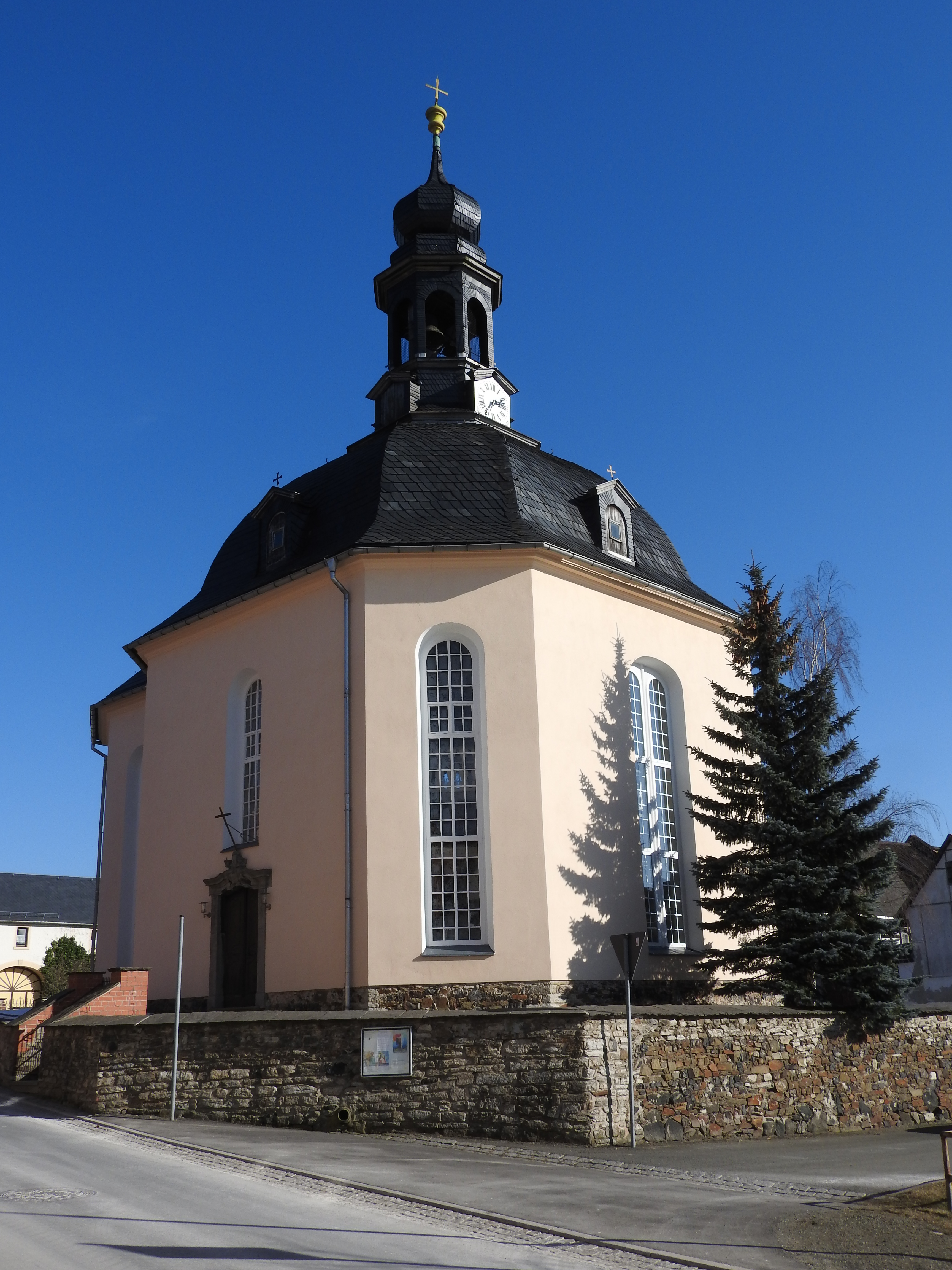 Kirche in Lössau, Schleiz, Thüringen